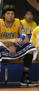 ニカ・ウィリアムスNyika Williams選手 高松ファイブアローズ在籍時